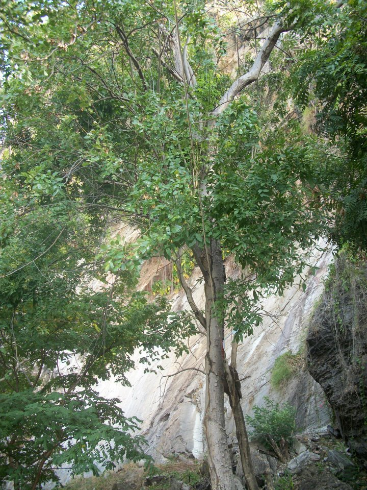 Braúna, árvore anacardiácea da caatinga